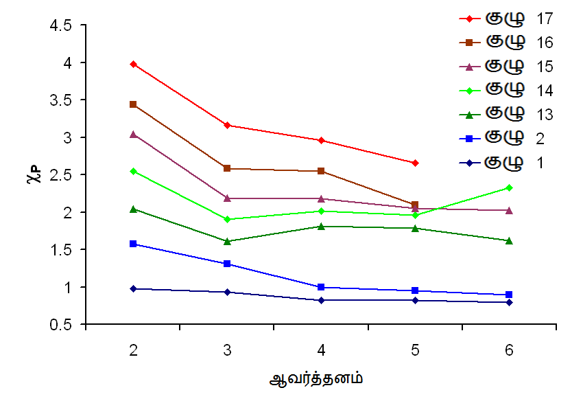 பௌலிங் மின்னெதிர்த்தன்மைப் பெறுமானம் (y-அச்சு) குற்றாவர்த்தனத்தில் குழு வழியே மேலிருந்து கீழாக மாறுபடும் விதம்.